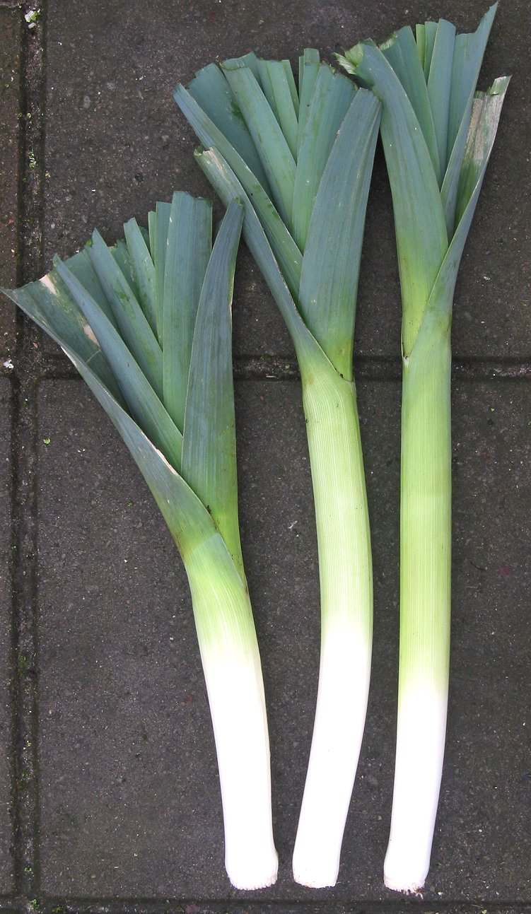 Leek, Prei (Allium porrum)